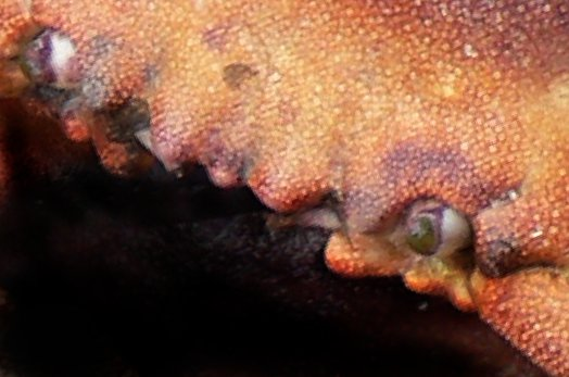 Oeil du crabe "Dormeur" (Cancer pagurus)